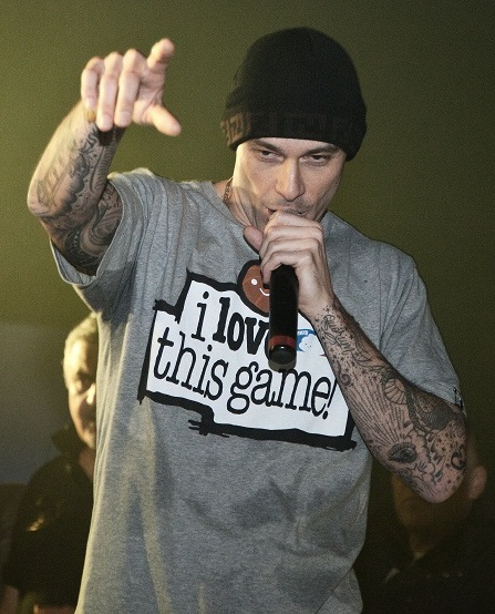 Fabri Fibra @ Altromondo Rimini 2011